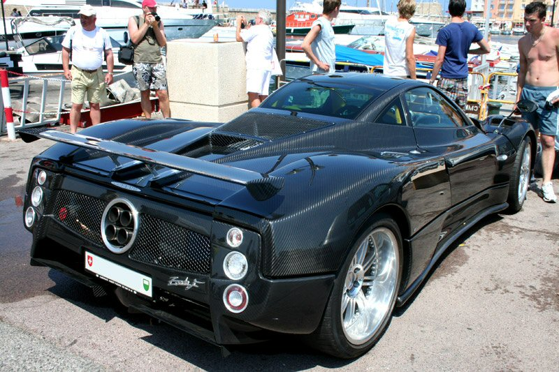 Pagani Zonda F (rear)